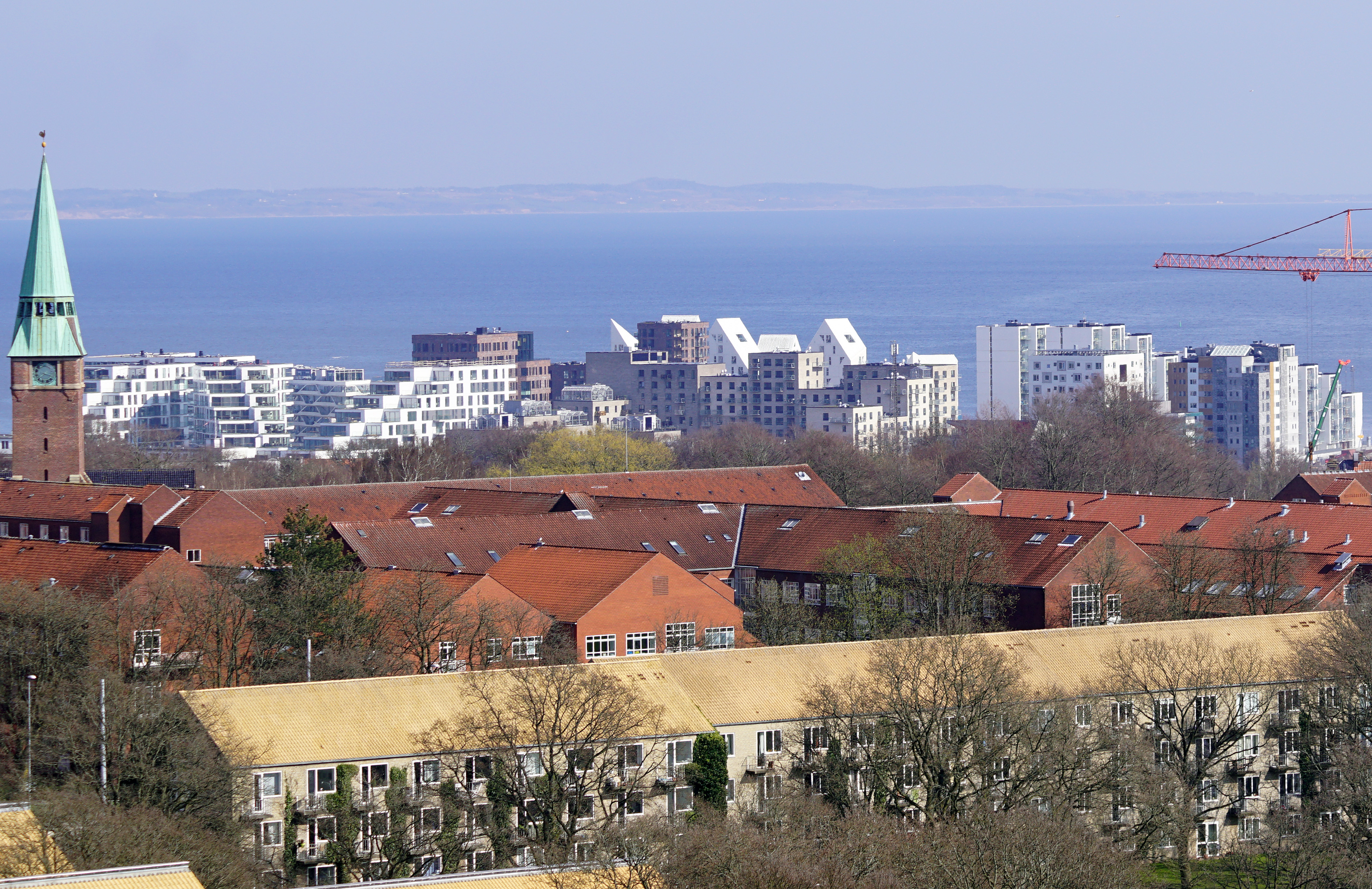 Aarhus Ø set fra Bogtårnet på Statsbiblioteket